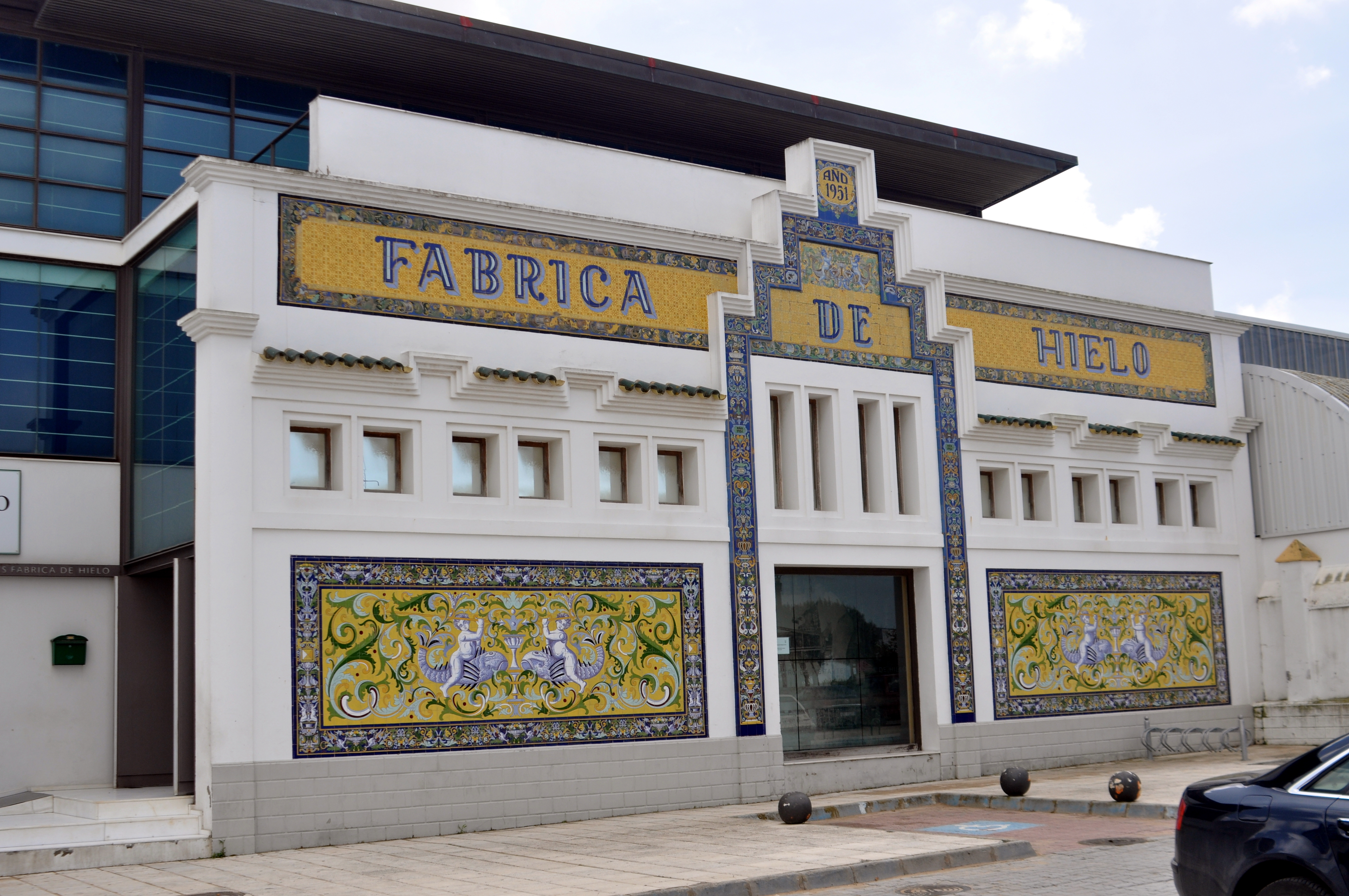 Fábrica de Hielo. Sanlúcar de Barrameda (provincia de Cádiz, España).